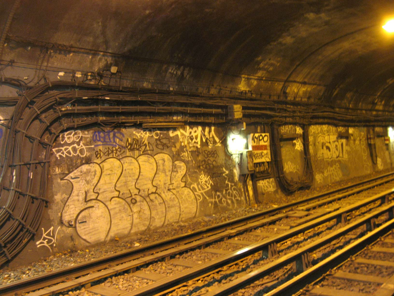 Tunnel tagué du Métro de Paris, Station Nation (ligne 2), Paris, France